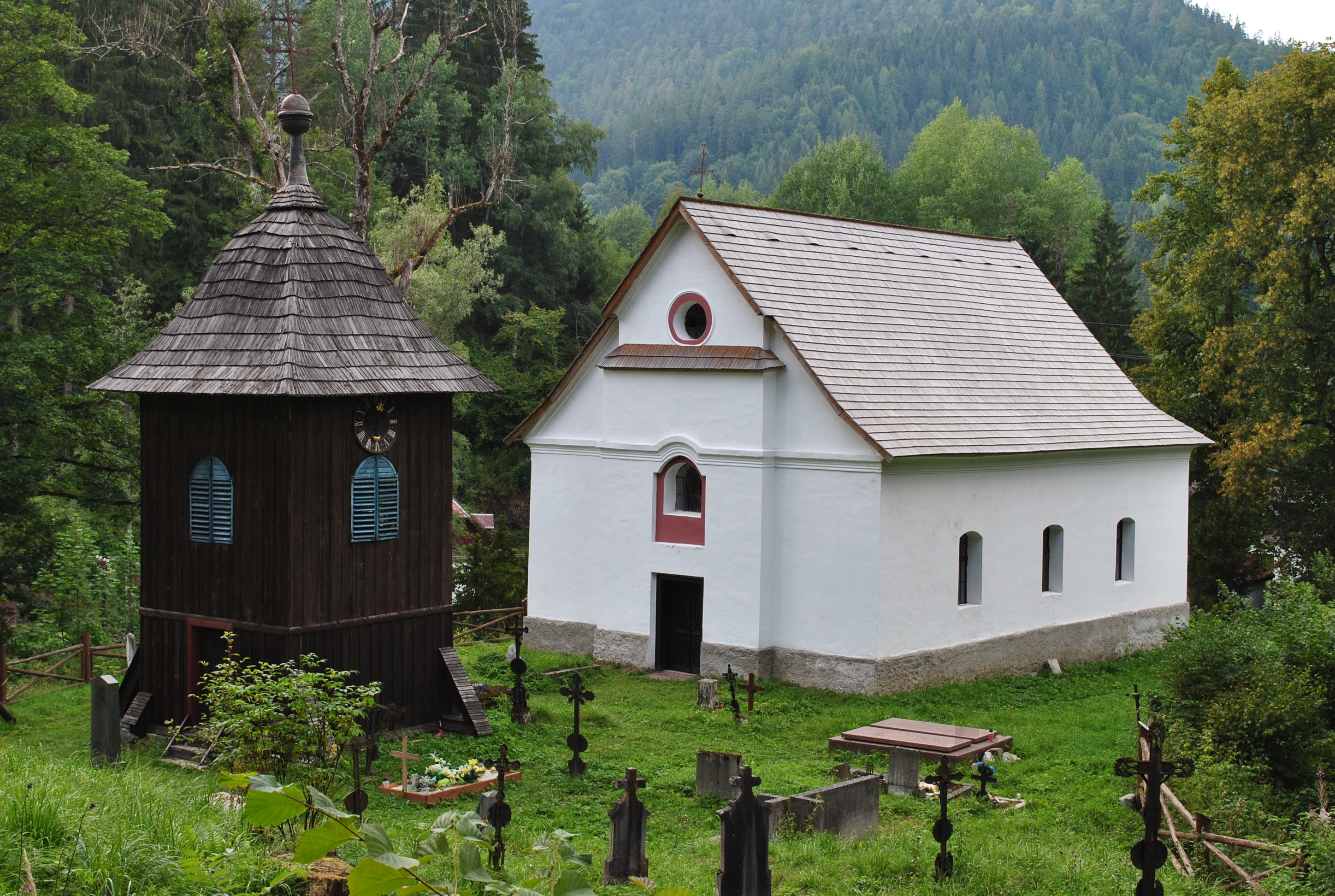 Kostol